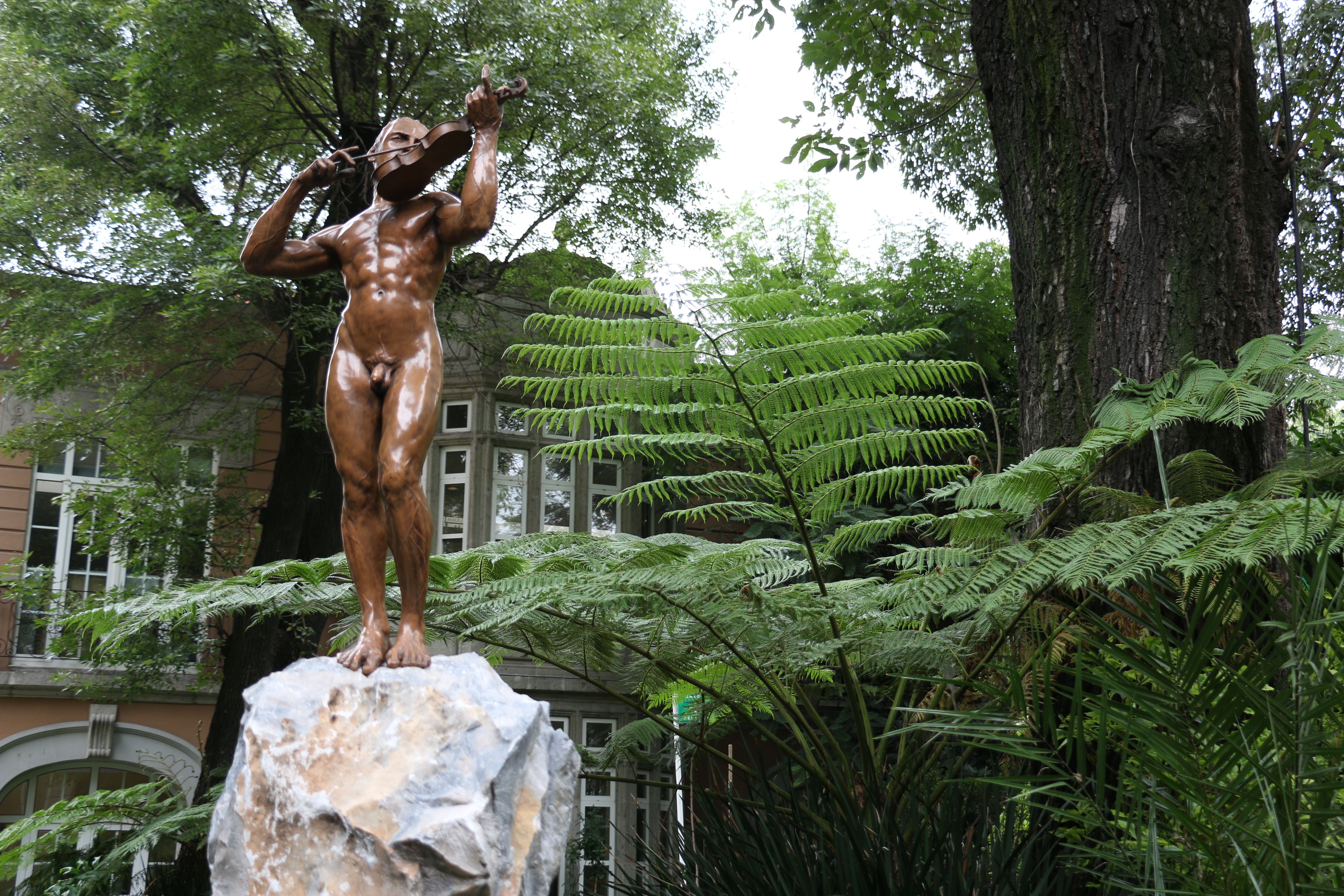 Escultura de bronce en el jardín de Casa Lamm en la Colonia Roma, Ciudad de México.